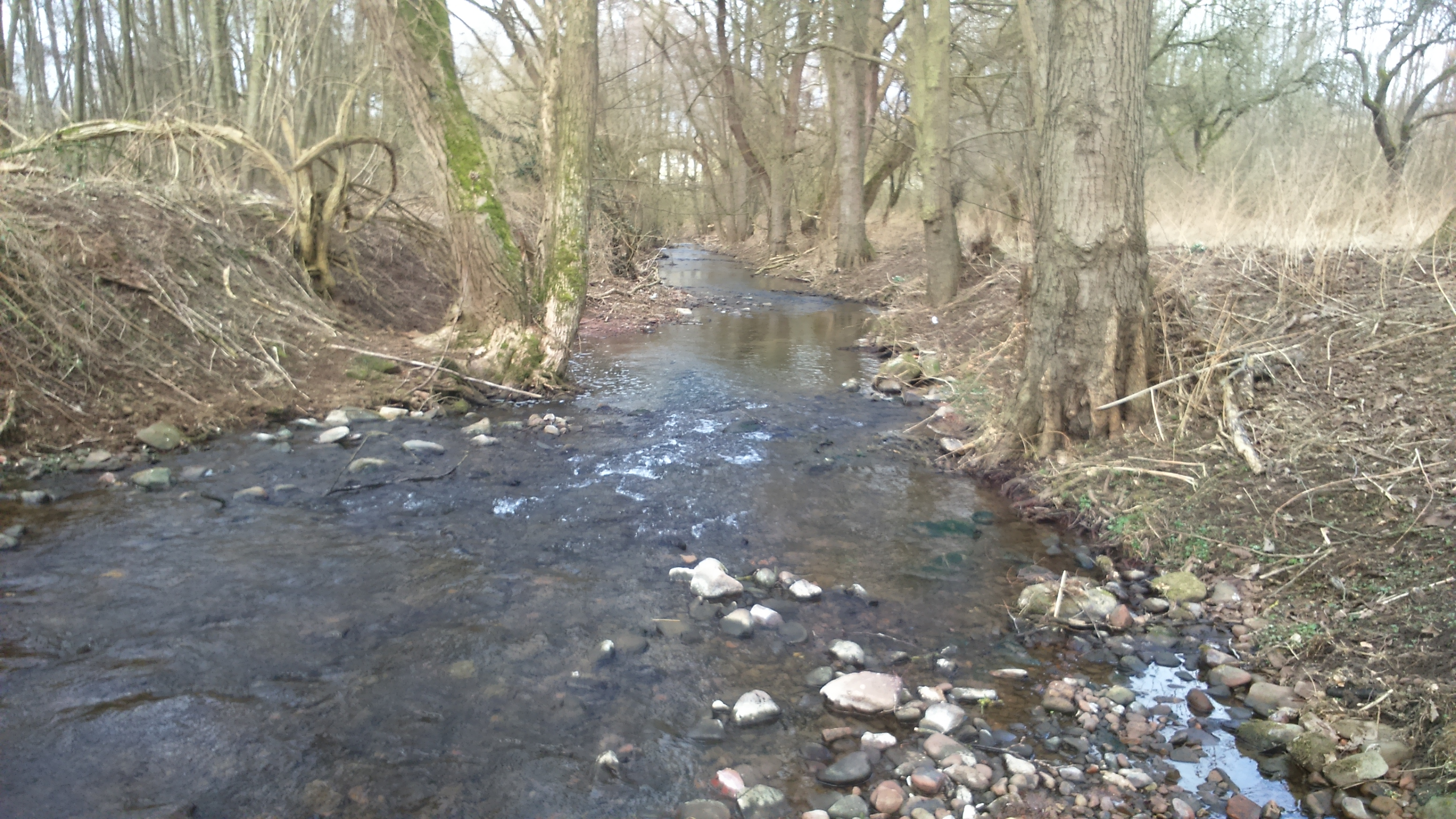 Der Wildbach nördlich von Boxtal